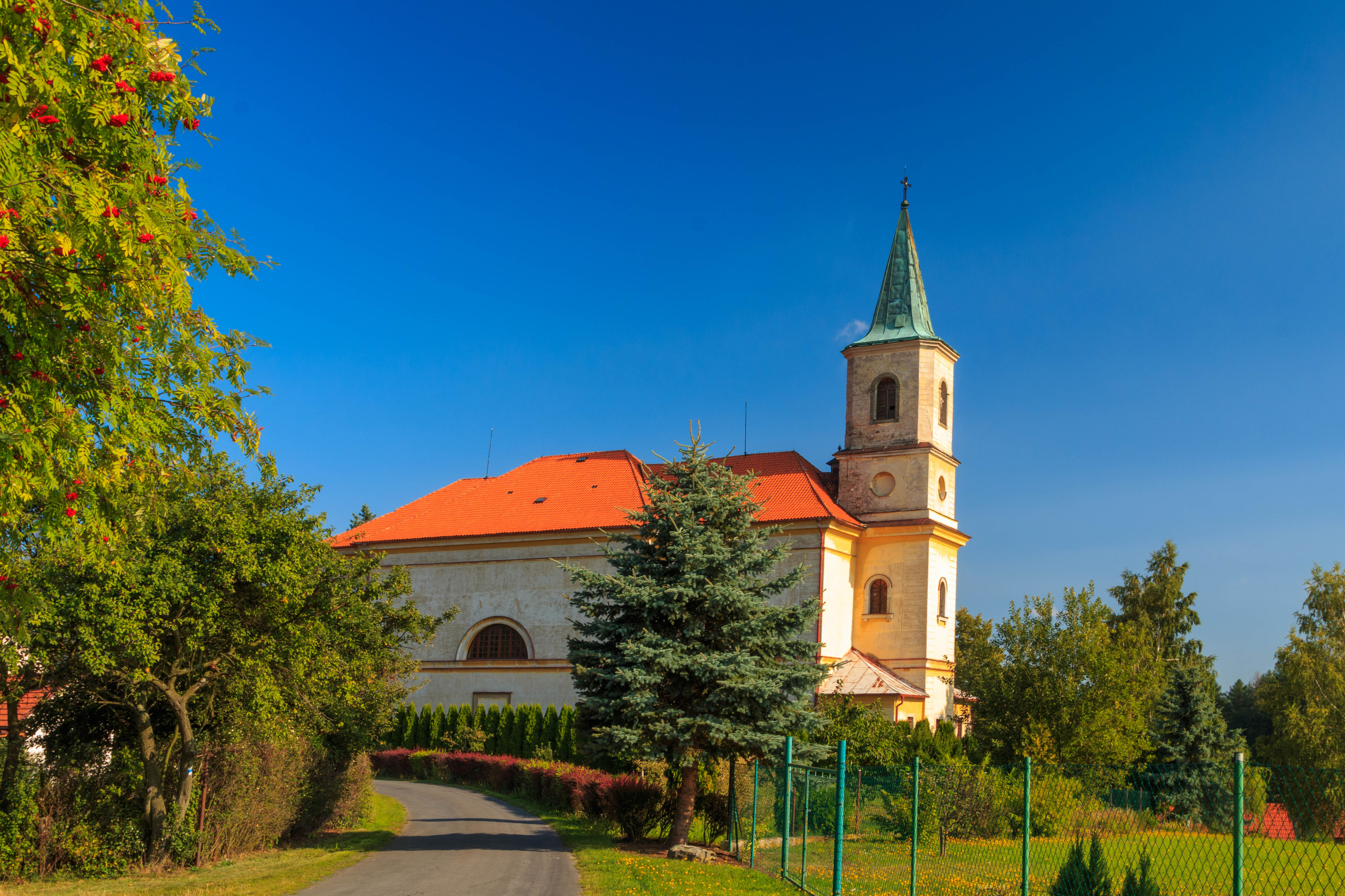 Kostel svaté Maří Magdalény, náves, Včelákov.